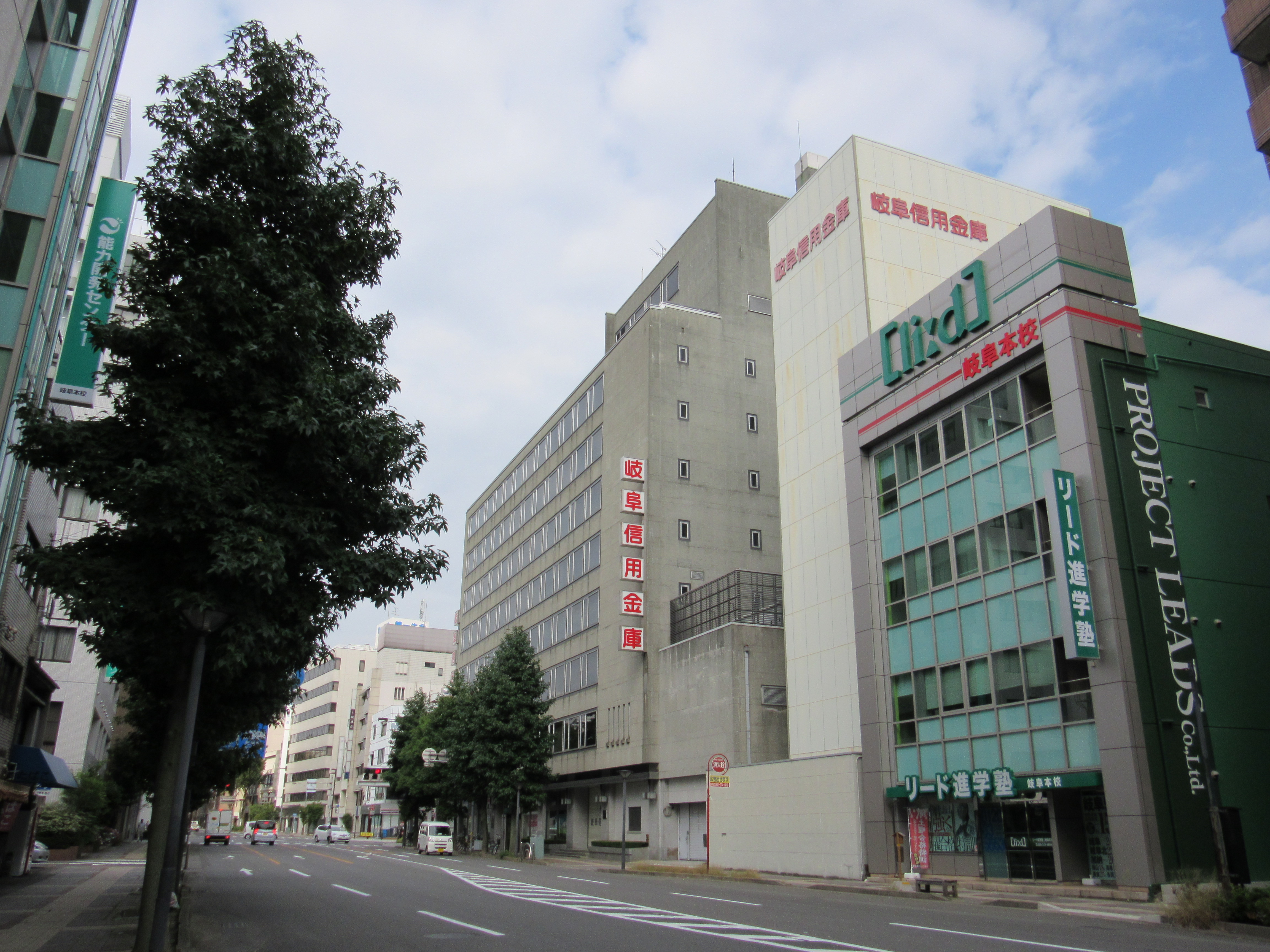 岐阜信用金庫本店